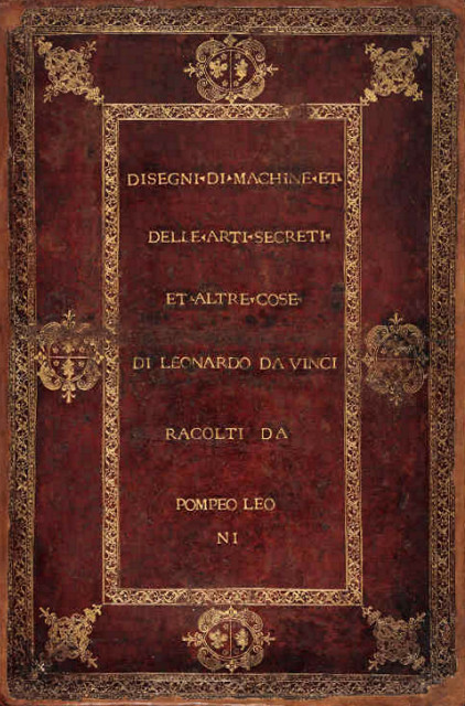 Legatura del Codice Atlantico